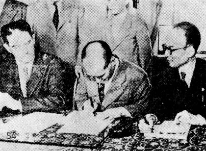 미군정청 간부로부터 행정권을 이양받는 이범석 총리와 윤치영 내무장관, 이범석의 뒷줄에서 지켜보는 사람은 유진오